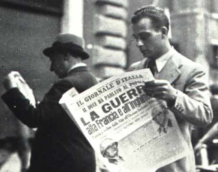 La notizia dell'entrata in guerra dell'Italia sui giornali dell'11 giugno 1940.